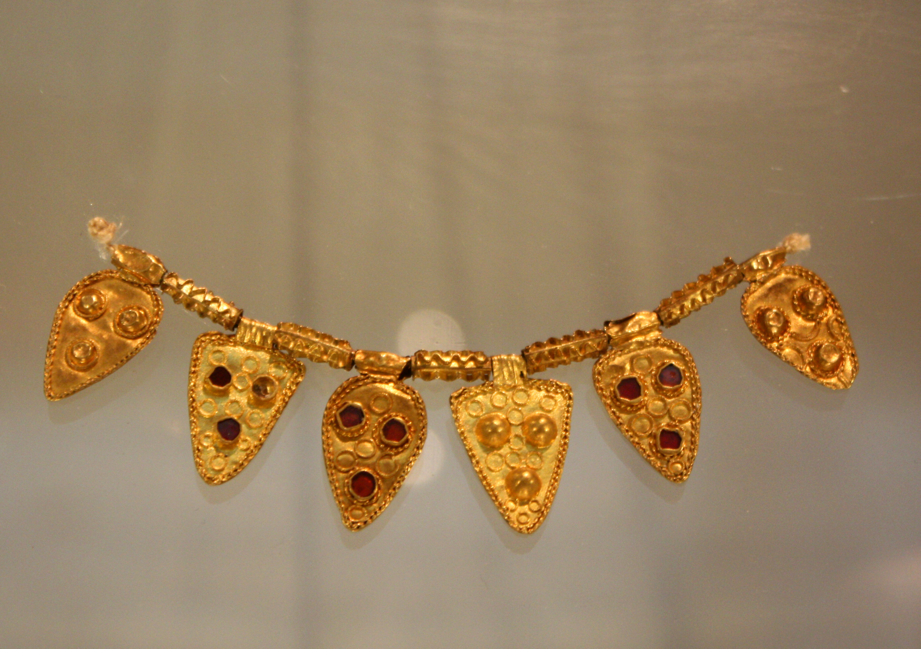 Rommerskirchen, Halskette als Beigabe eines Frauengrabes (Grab 136) vom Anfang des 8. Jahrhunderts. Begleittext und Ort der Ausstellung: Rheinisches Landesmuseum Bonn